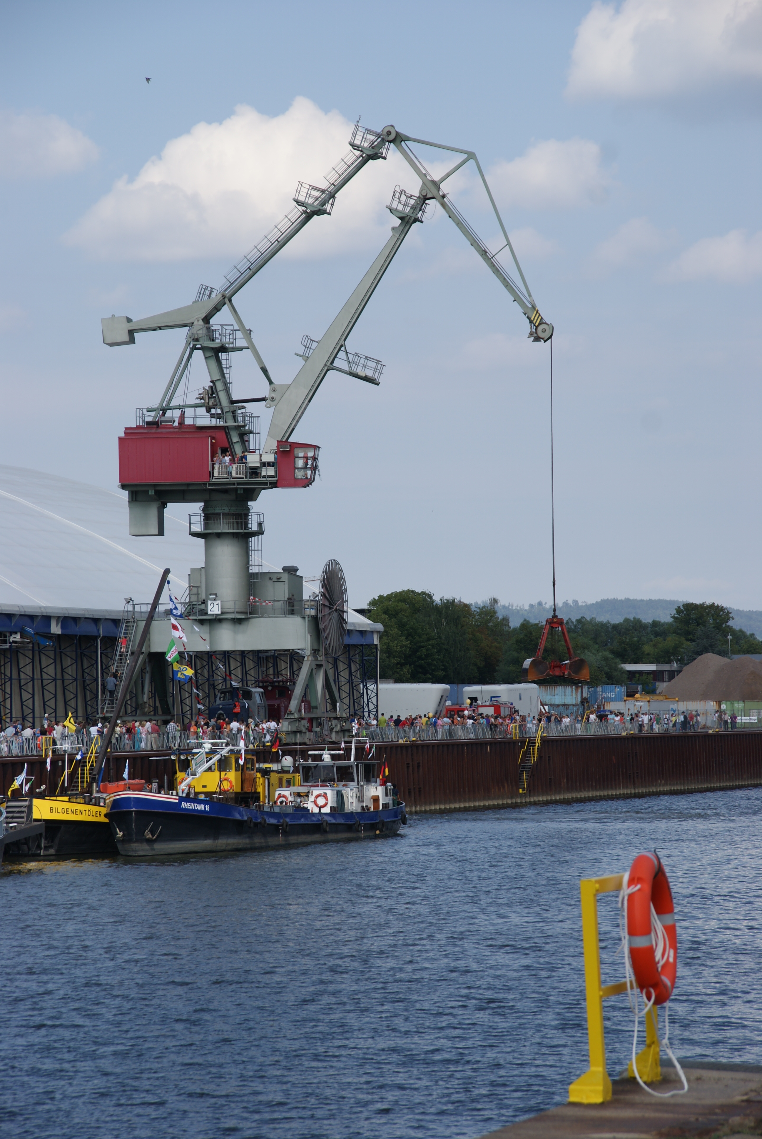 Hafenkran im Regensburger Westhafen